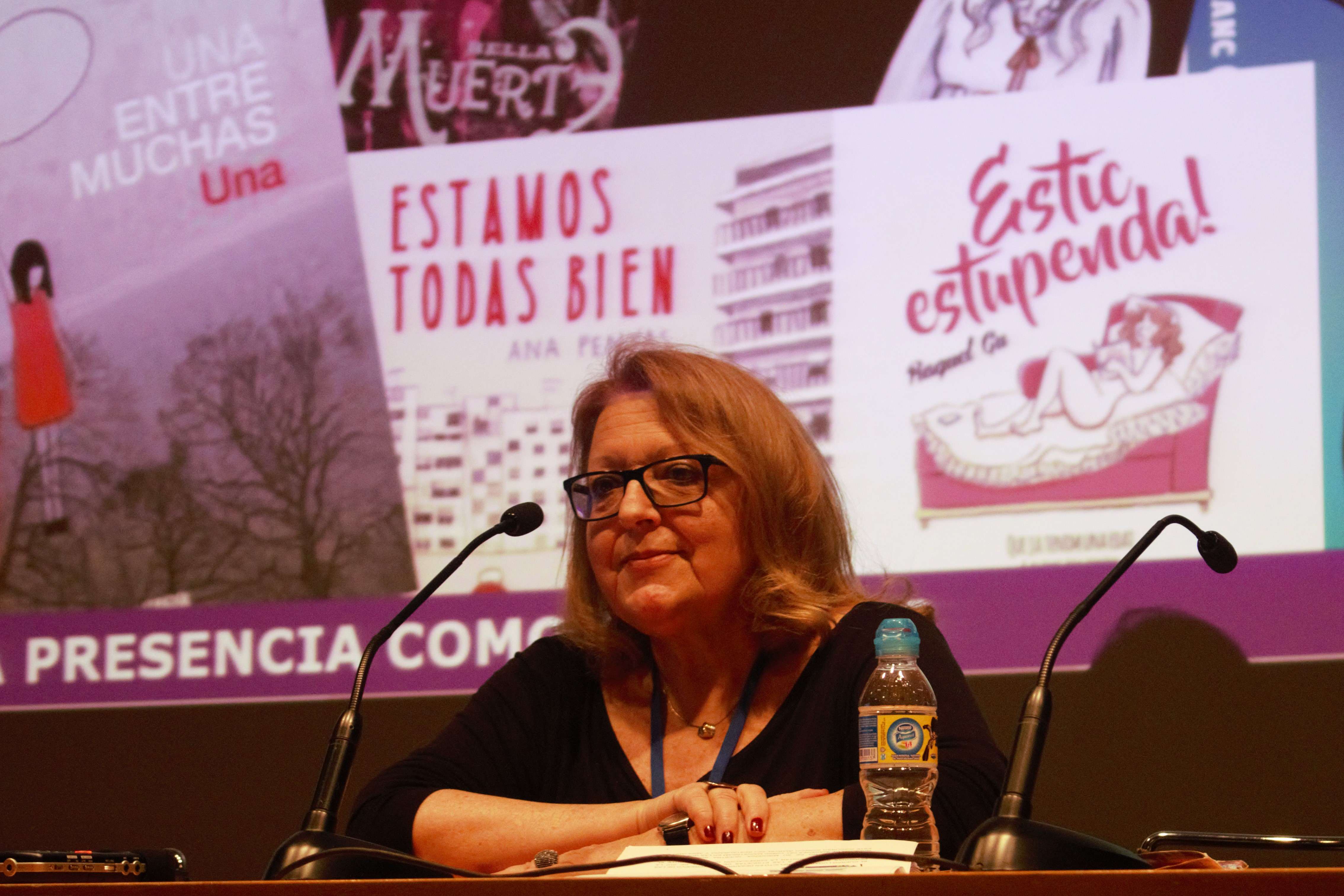 La il·lustradora de còmic catalana María del Carmen Vila Migueloa, més coneguda com a Marika a la conferència "El cuerpo ocupado: la voz de las mujeres en el cómic español". Saló Internacional del Còmic de Barcelona de 2018.